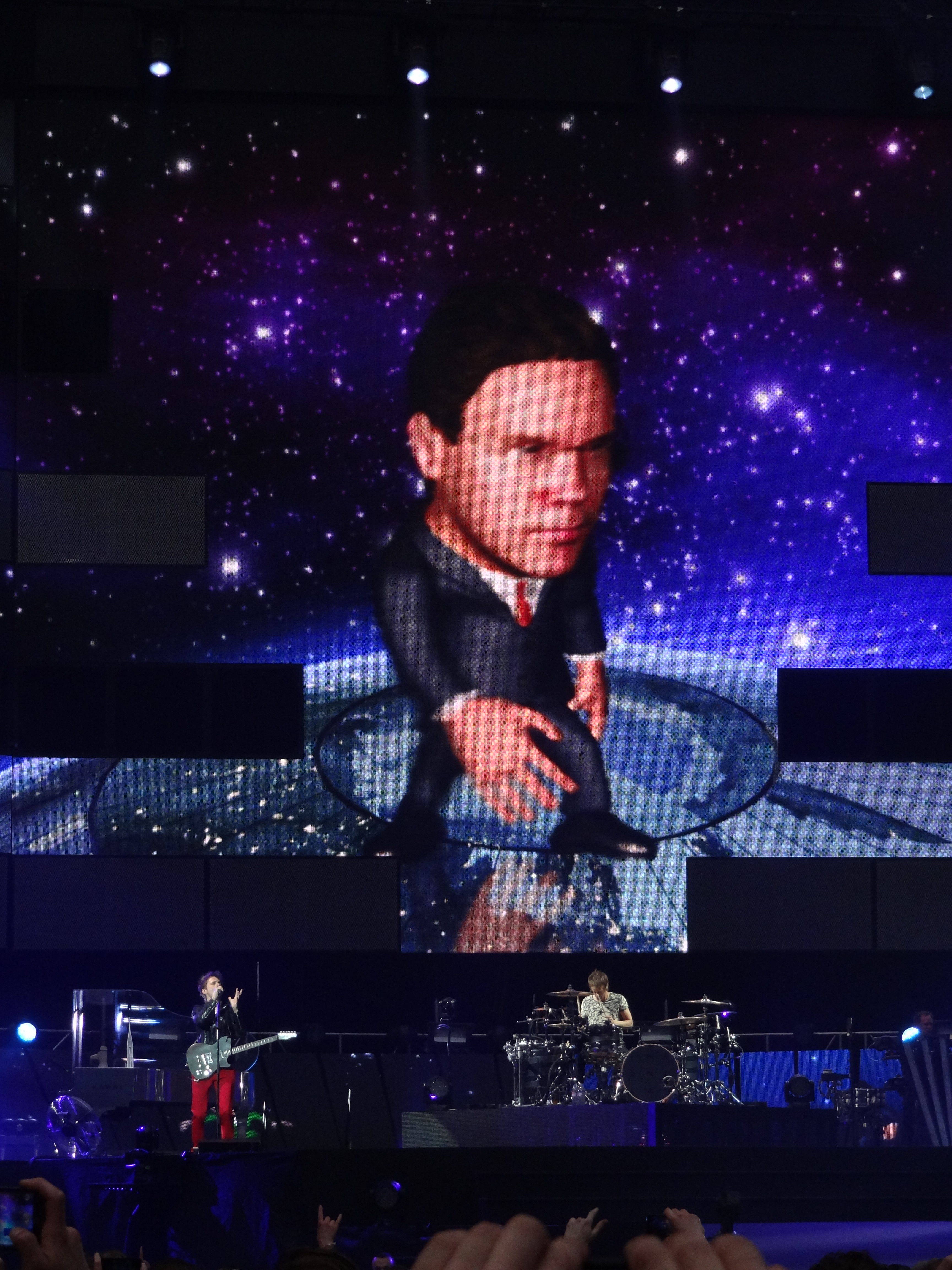 Premier Mark Rutte danst mee in de Amsterdam ArenA. Hij is te zien op een groot scherm, samen met andere wereldleiders zoals Poetin, Obama en Merkel.